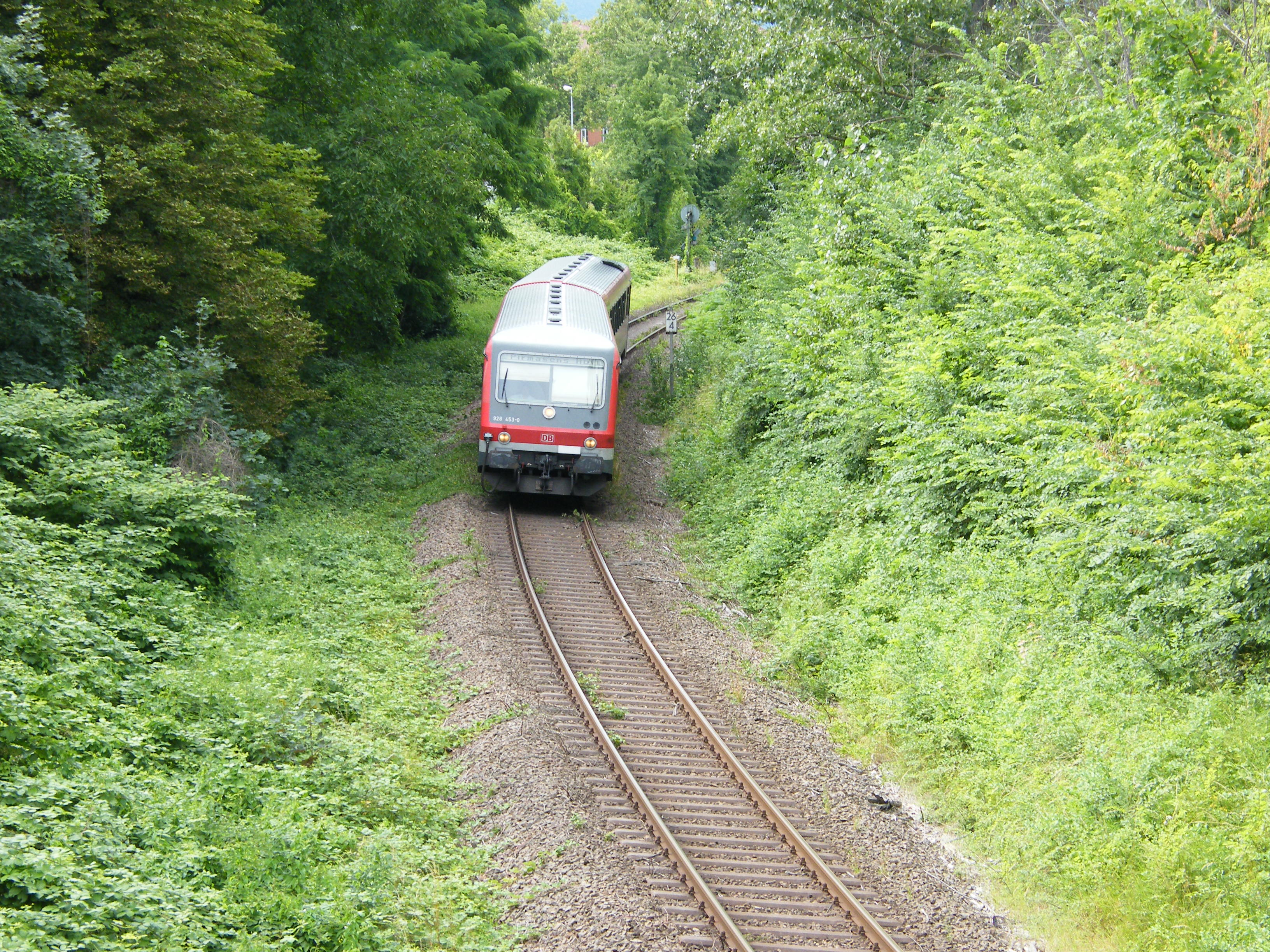 Queichtalbahn zwischen Landau Hbf und Landau West